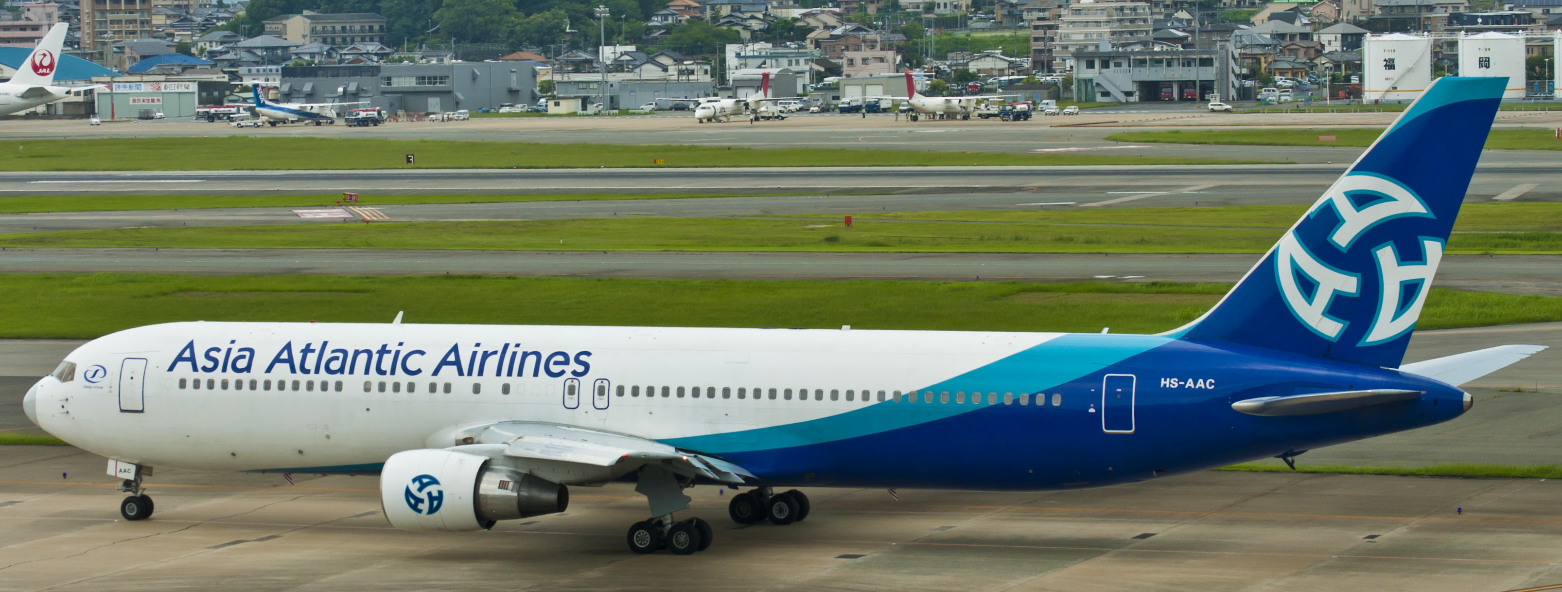 アジア・アトランティック・エアラインズのボーイング767-300ER。チャーター便にて飛来した機体を福岡空港にて撮影。